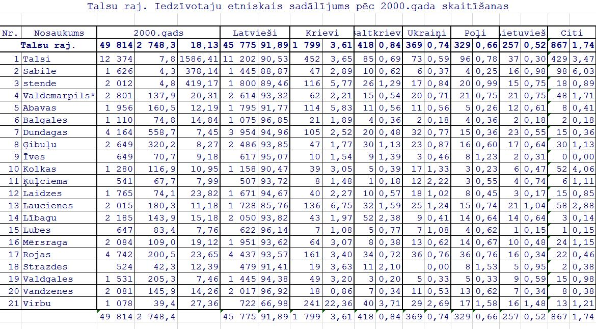 результаты переписи населения Латвии ни 01.04.2000